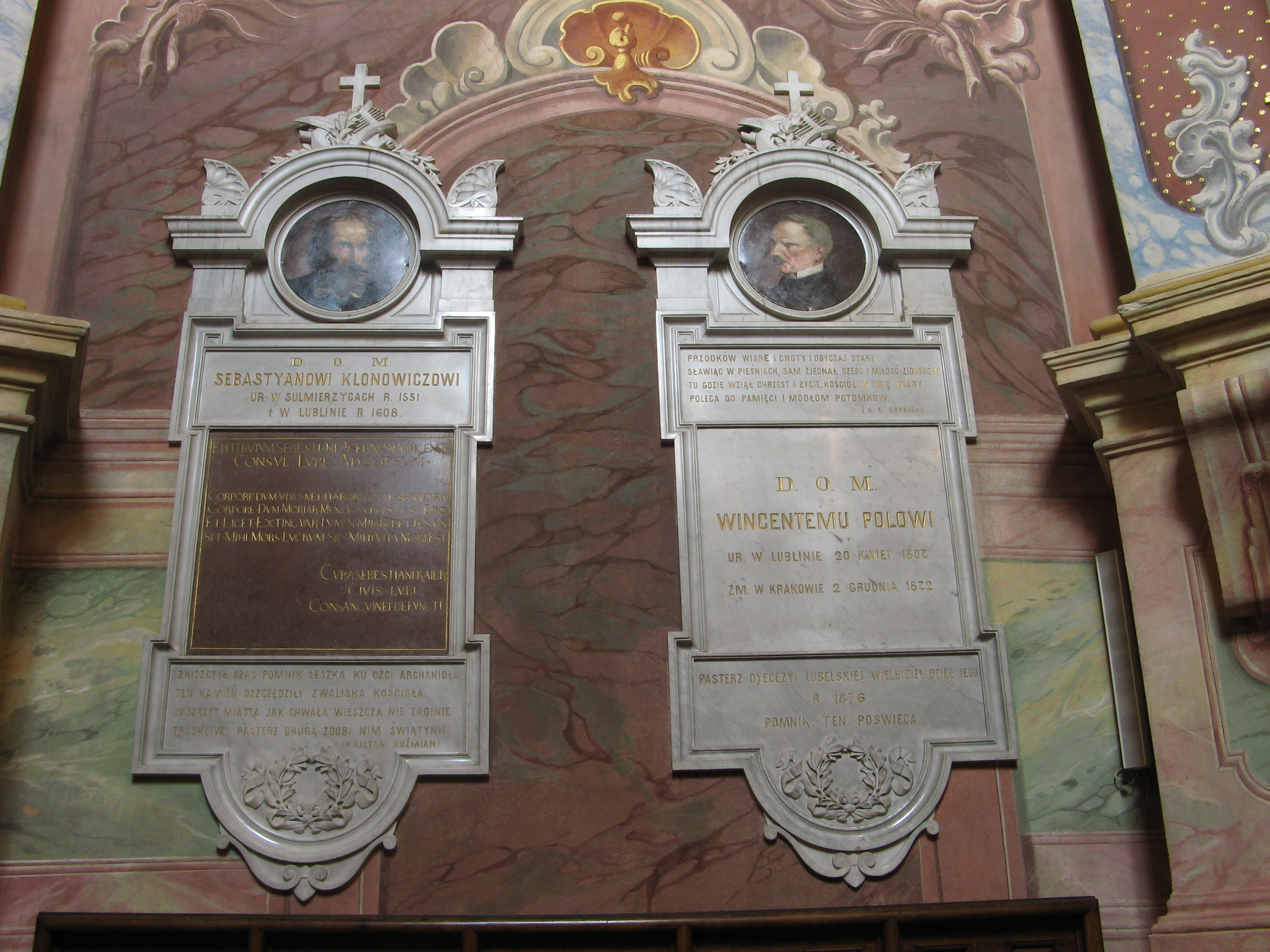 Archikatedra Lubelska - tablice pamiątkowe ku czci Sebastiana Klonowicza i Wincentego Pola.